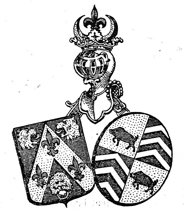 Praenobilis Familia